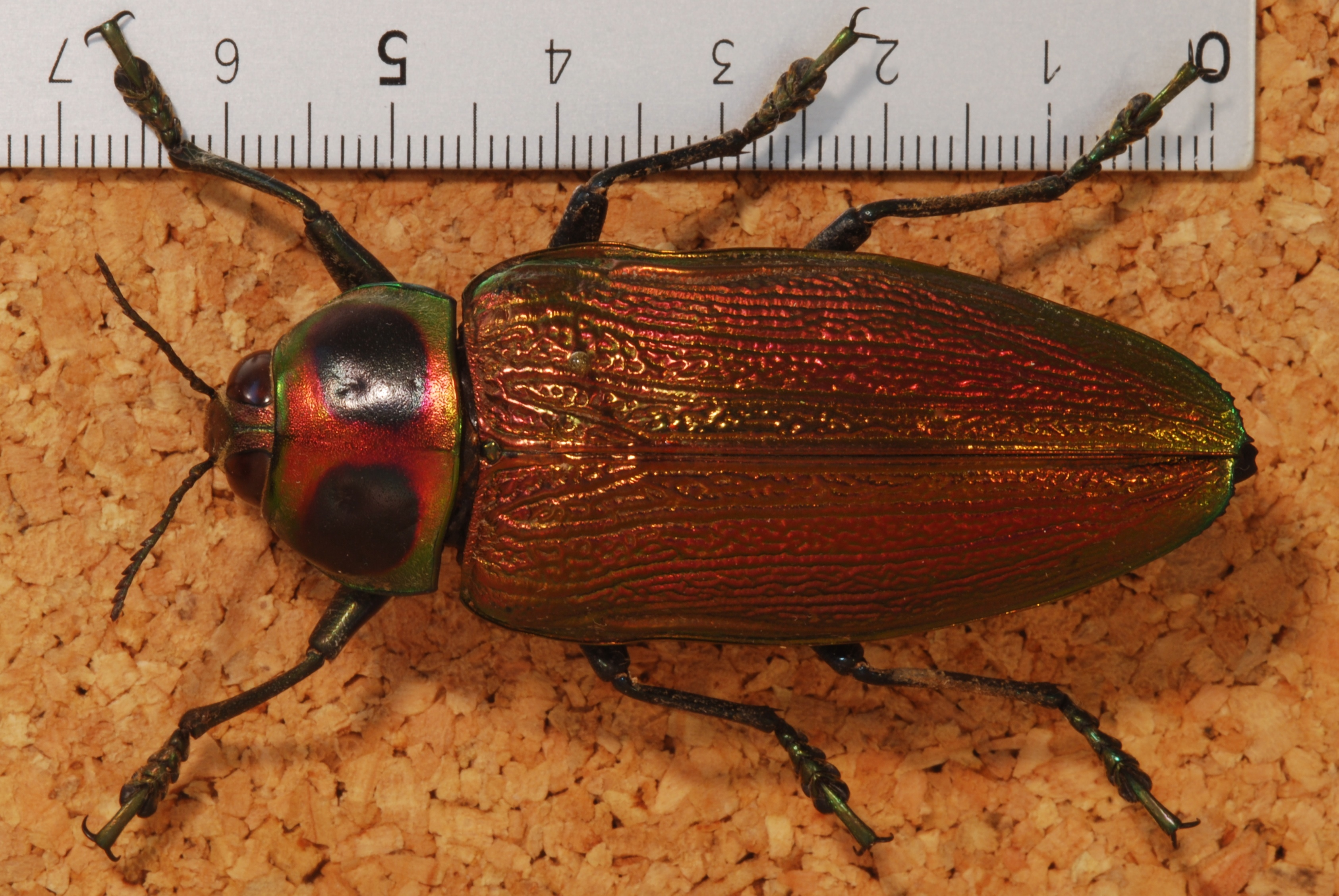 Meteti, Darien, PANAMA